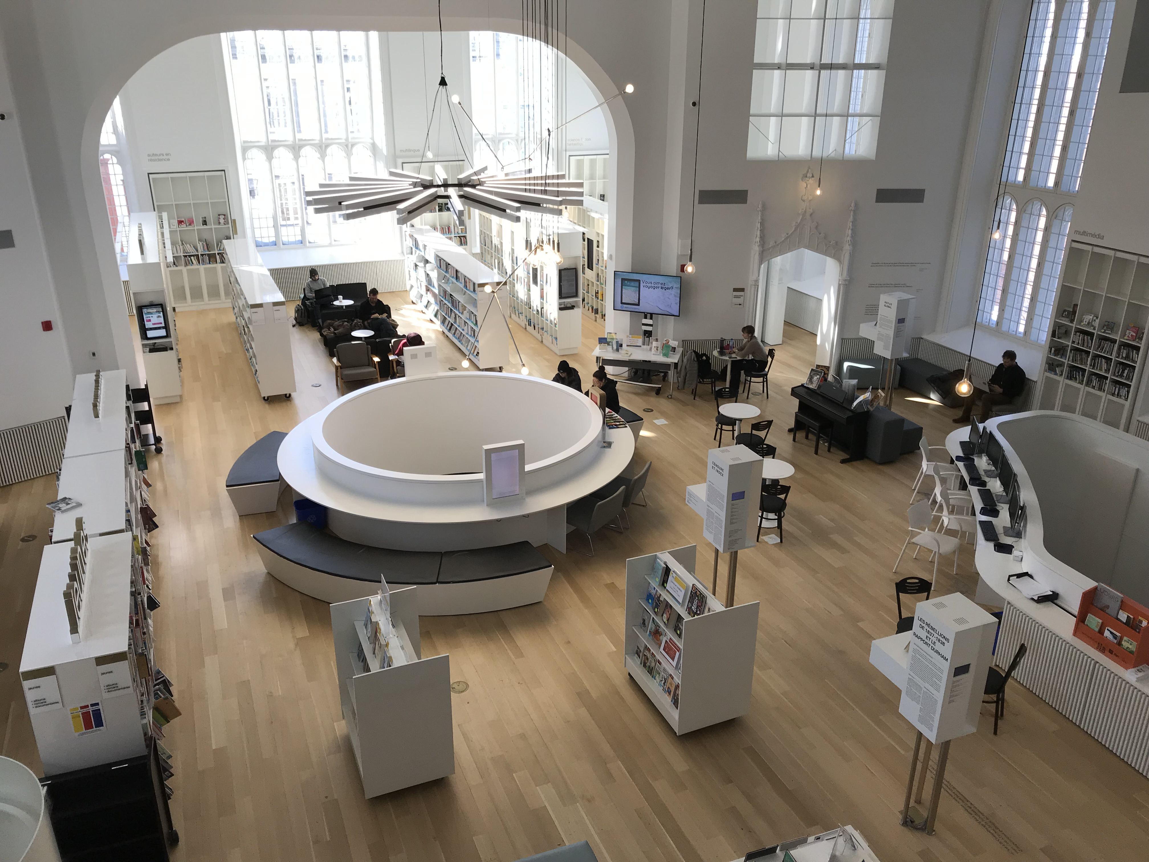 Maison de la littérature, février 2019.